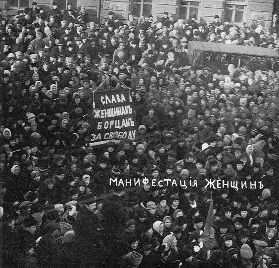 Emakumeen protesta Petrogradon, Emakumeen Nazioarteko Egunean, 1917